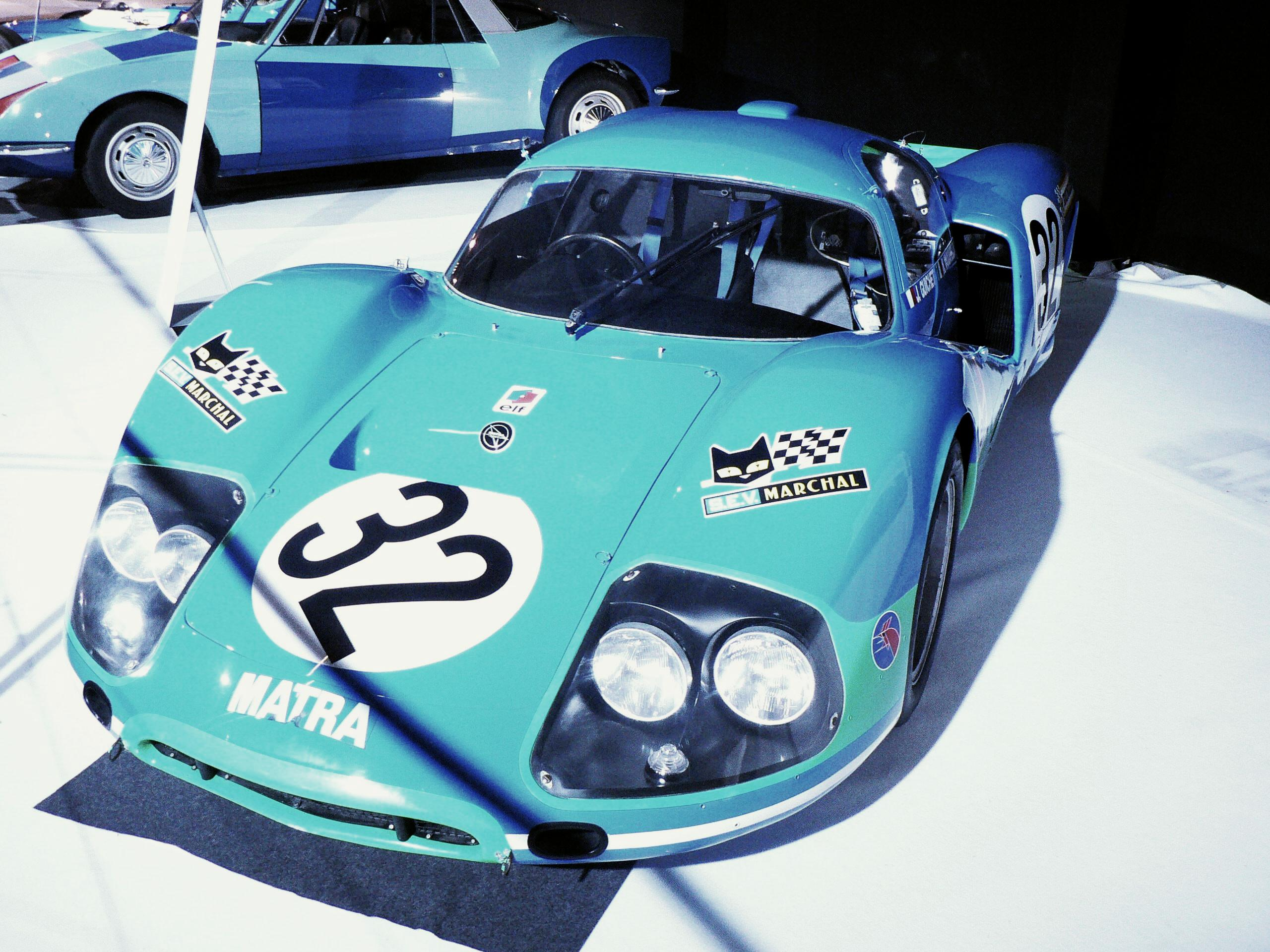 Mondial de l automobile de Paris (October 2006)